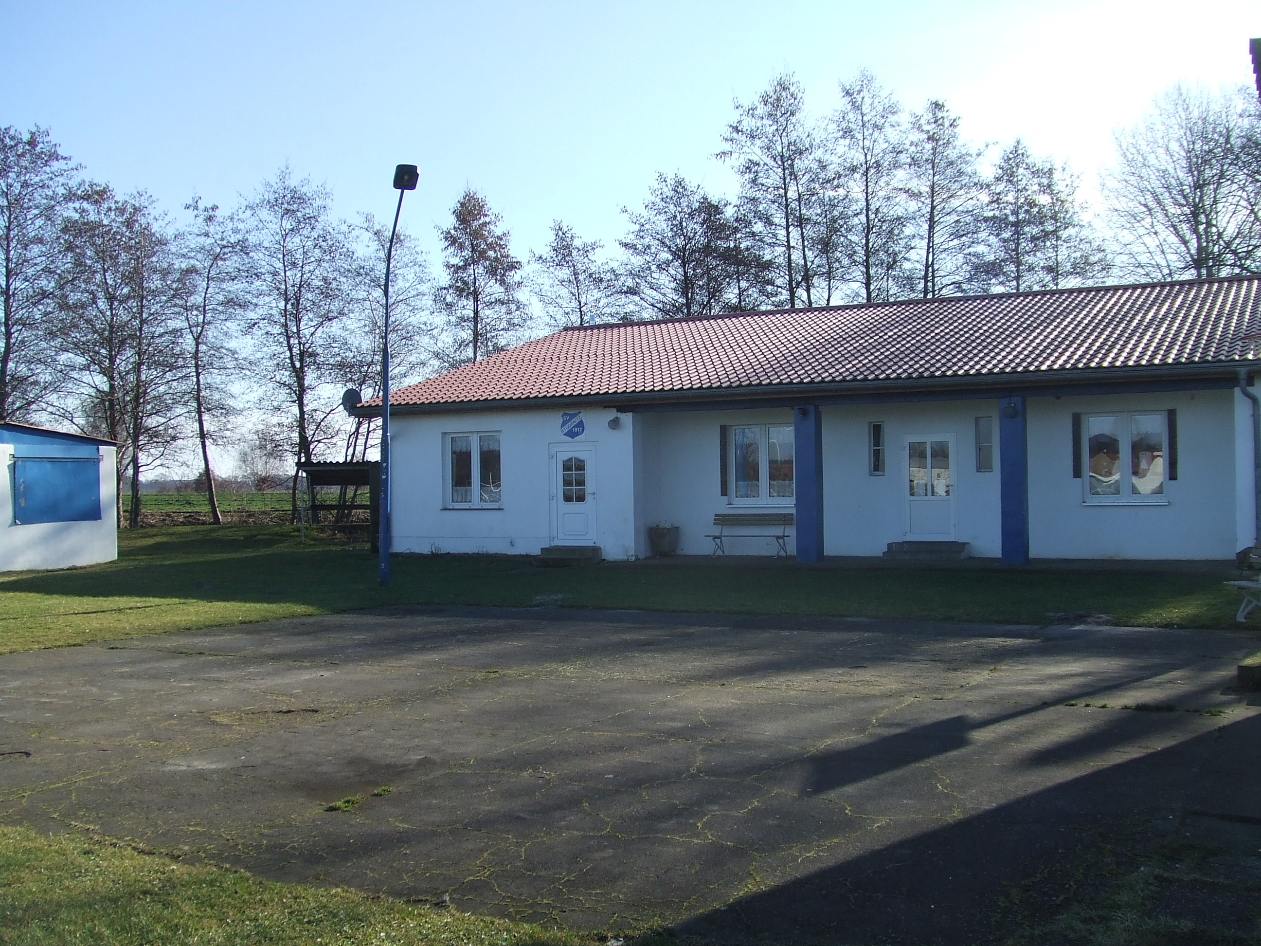 Sporthaus des SV Stüderitz, Deutschland.